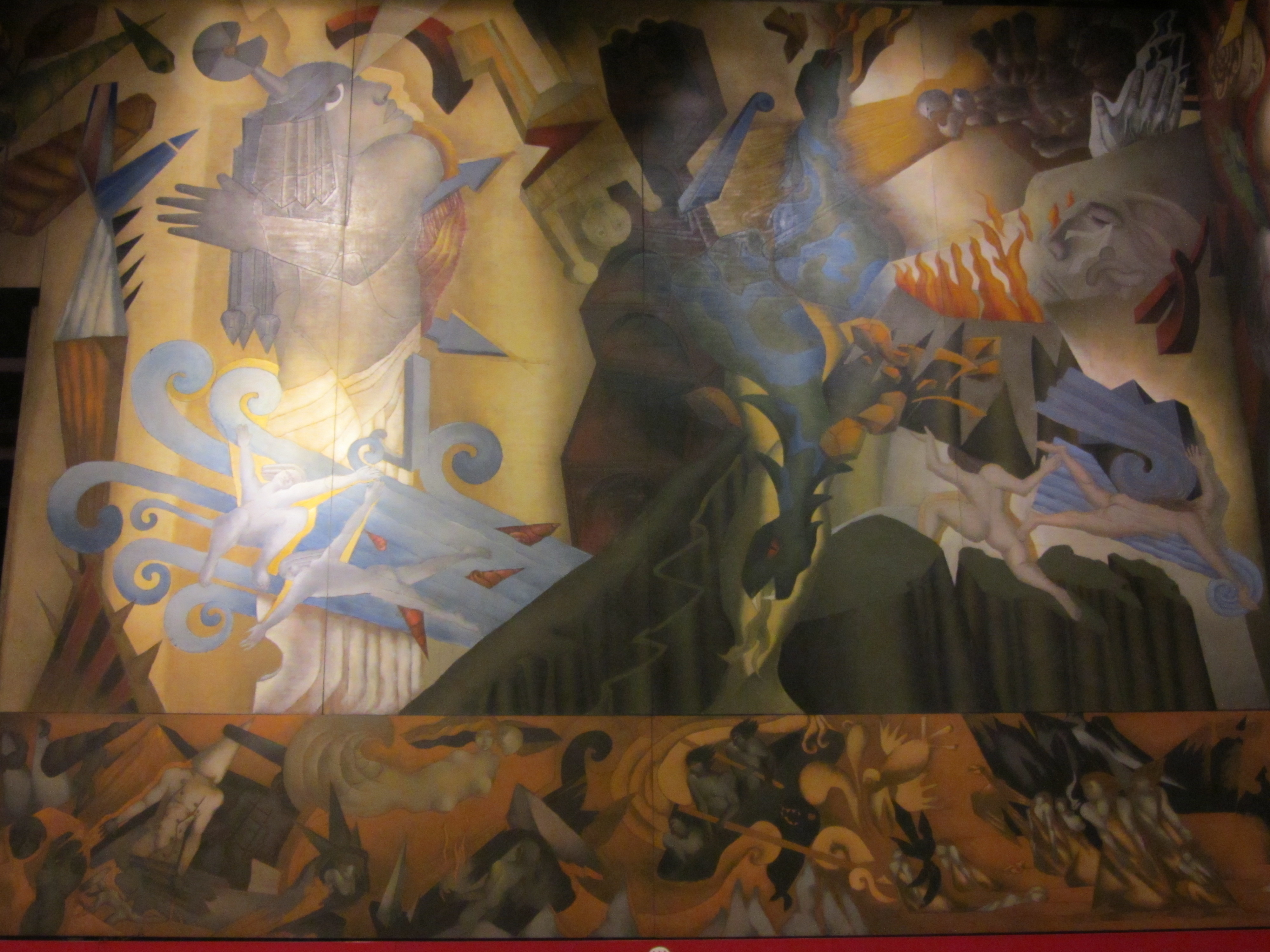 Antiguos pobladores, mural del pintor chileno Mario Toral que forma parte de la gran obra titulada Memoria visual de una nación, metro Universidad de Chile, en Santiago de Chile. El panel está en el nororiente de la estación. El fragmento representa la creación del mundo según la mitología mapuche.